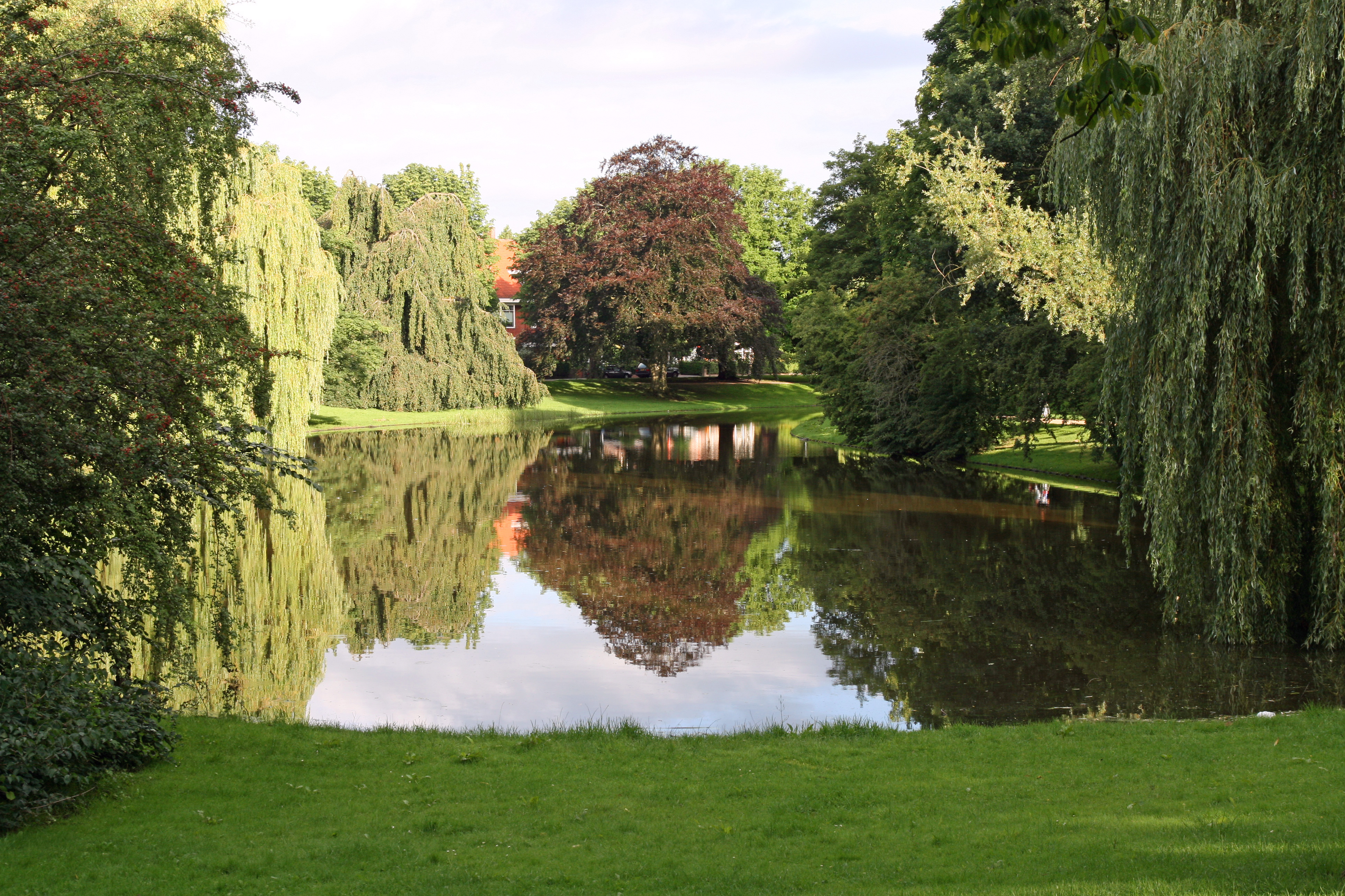 Noorderplantsoen